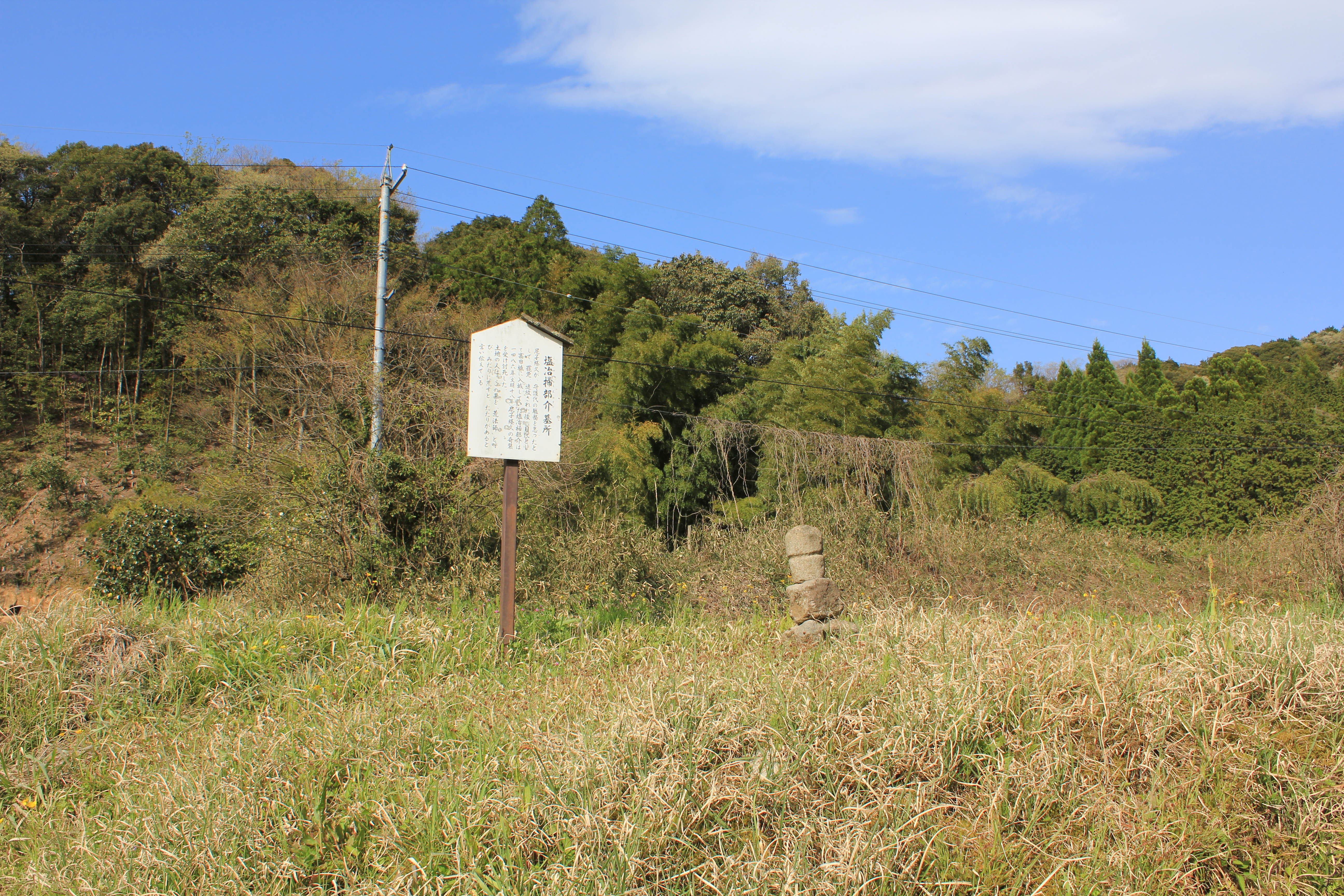 尼子経久に殺害された塩冶掃部介のものとされる墓